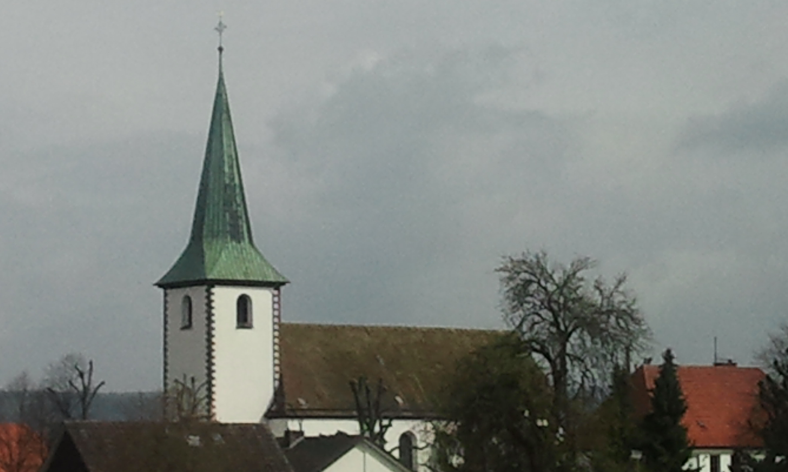 Das Bild zeigt die Südseite der “ St. Petri in Ketten“.